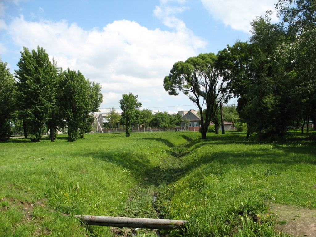 Fortress of Slutsk (Slutsk, Belarus)